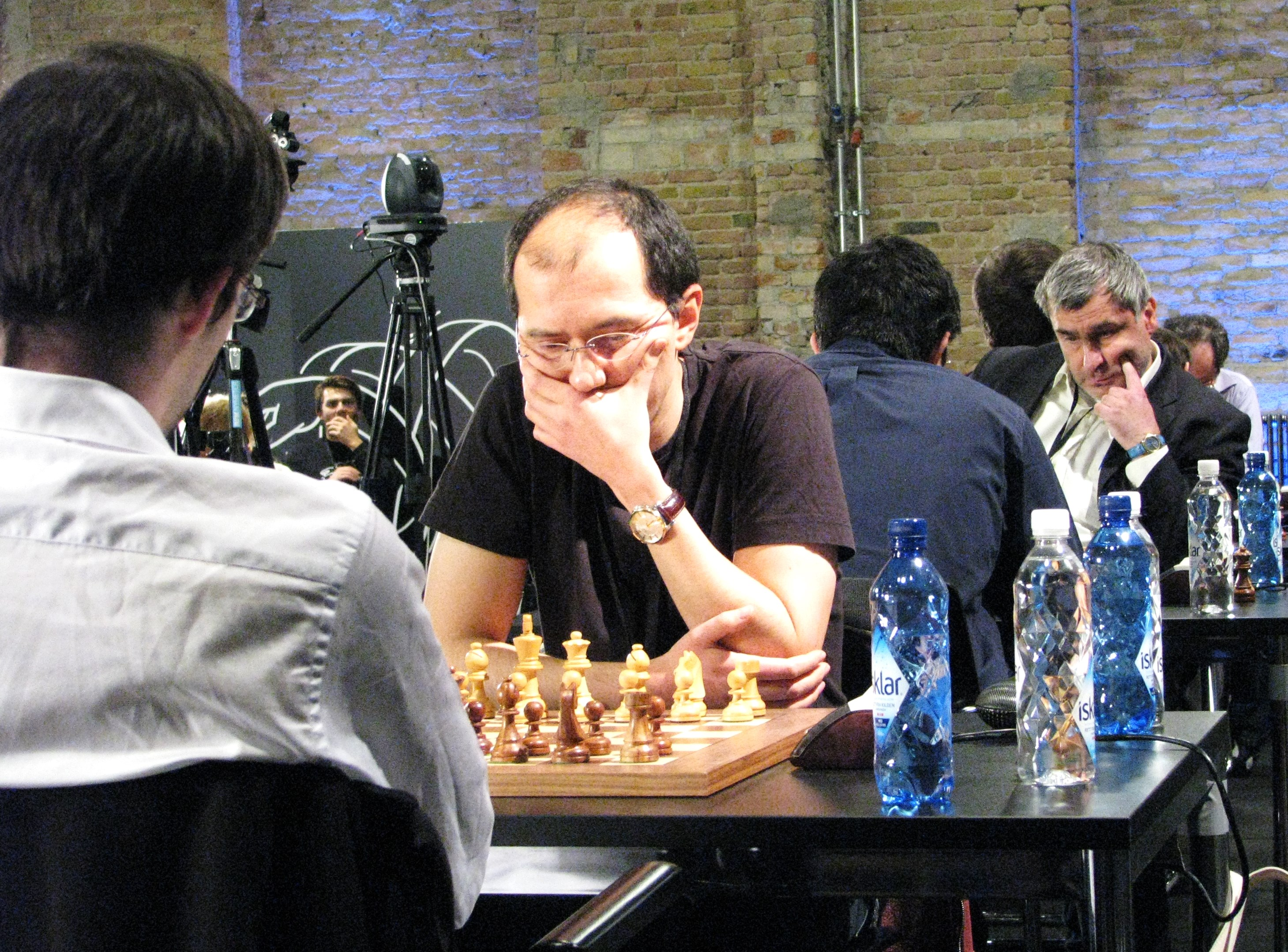 Ivanchuk (am 2. Tisch rechts) in der 21. und letzten WM-Blitzrunde 2015